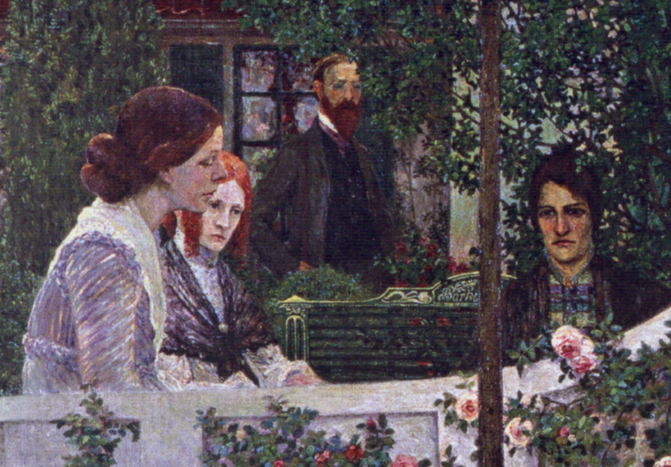 Detail aus: Sommerabend (Das Konzert). Öl auf Leinwand, 175 x 310 cm. Große Kunstschau Worpswede; Detail: Paula Modersohn-Becker, Agnes Wulff, Otto Modersohn und Clara Rilke-Westhoff